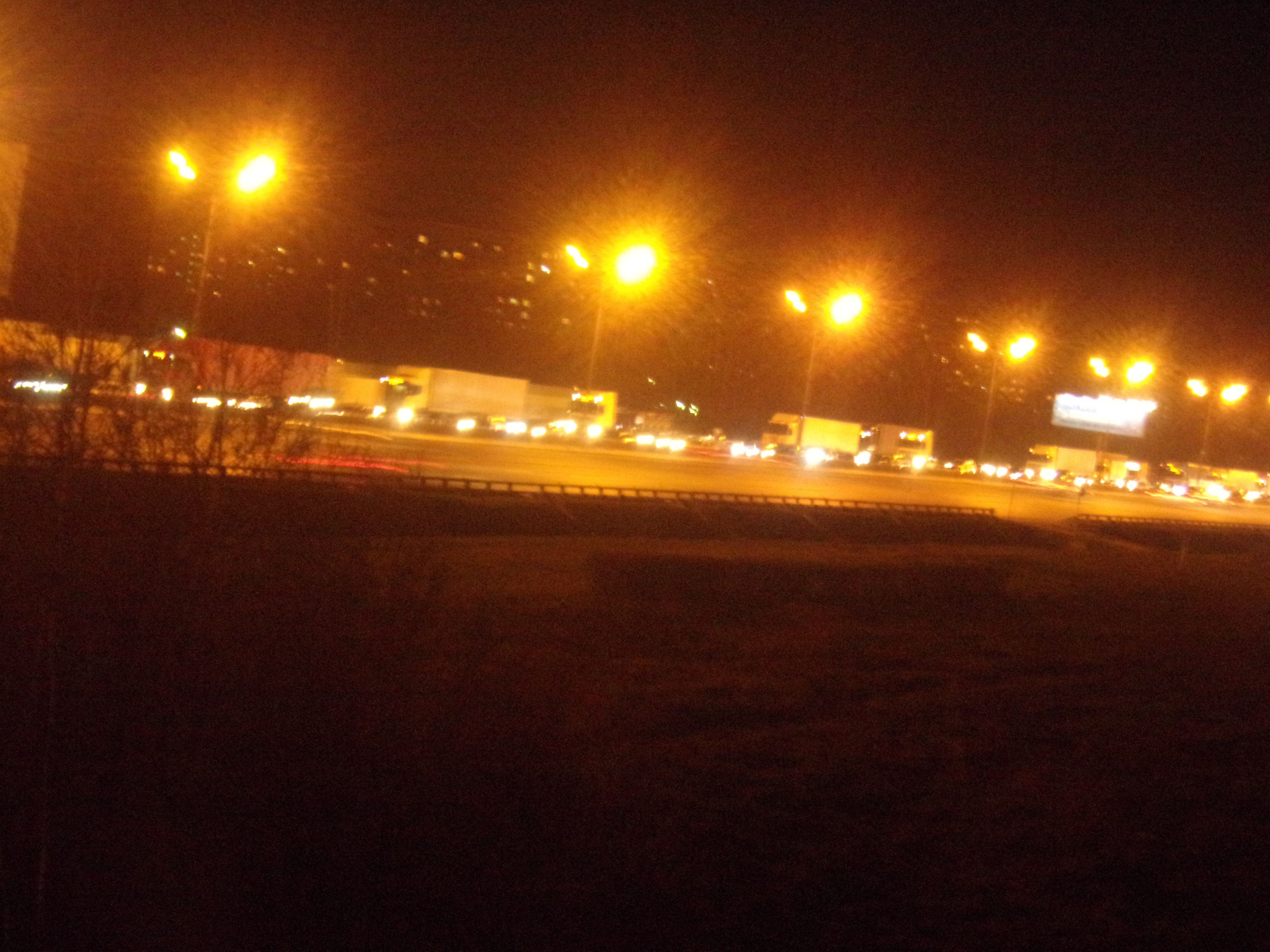 Акция водителей крупных грузовиков (дальнобойщиков) против системы сбора налогов Платон. Москва, 89 км МКАД, около 10 часов вечера